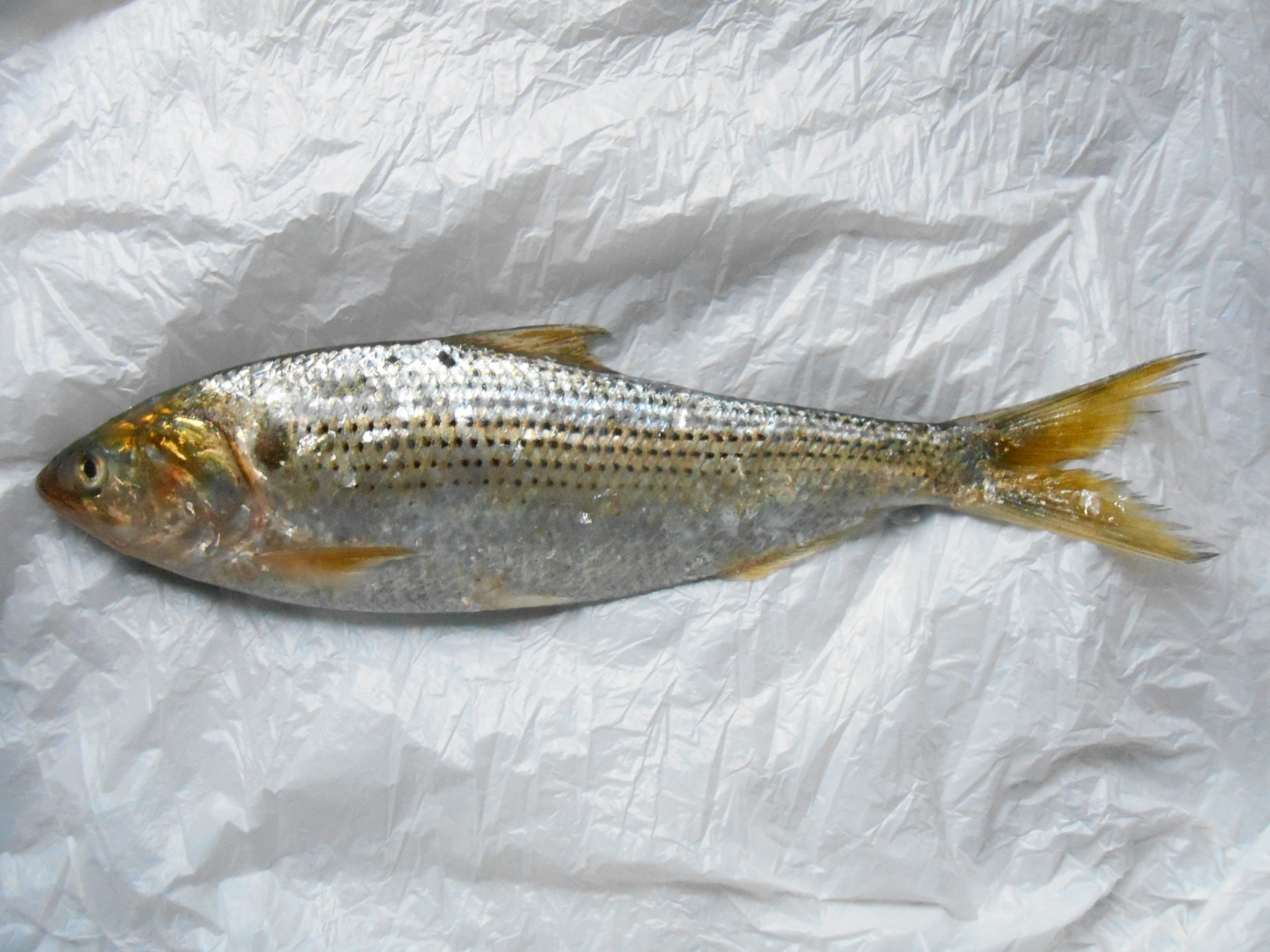 コノシロ、全長約29㎝、千葉県内のスーパーマーケットで購入